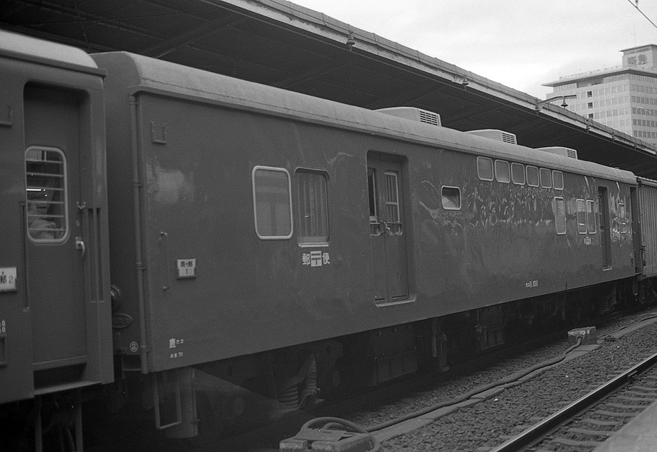 国鉄 オユ11 1000番台